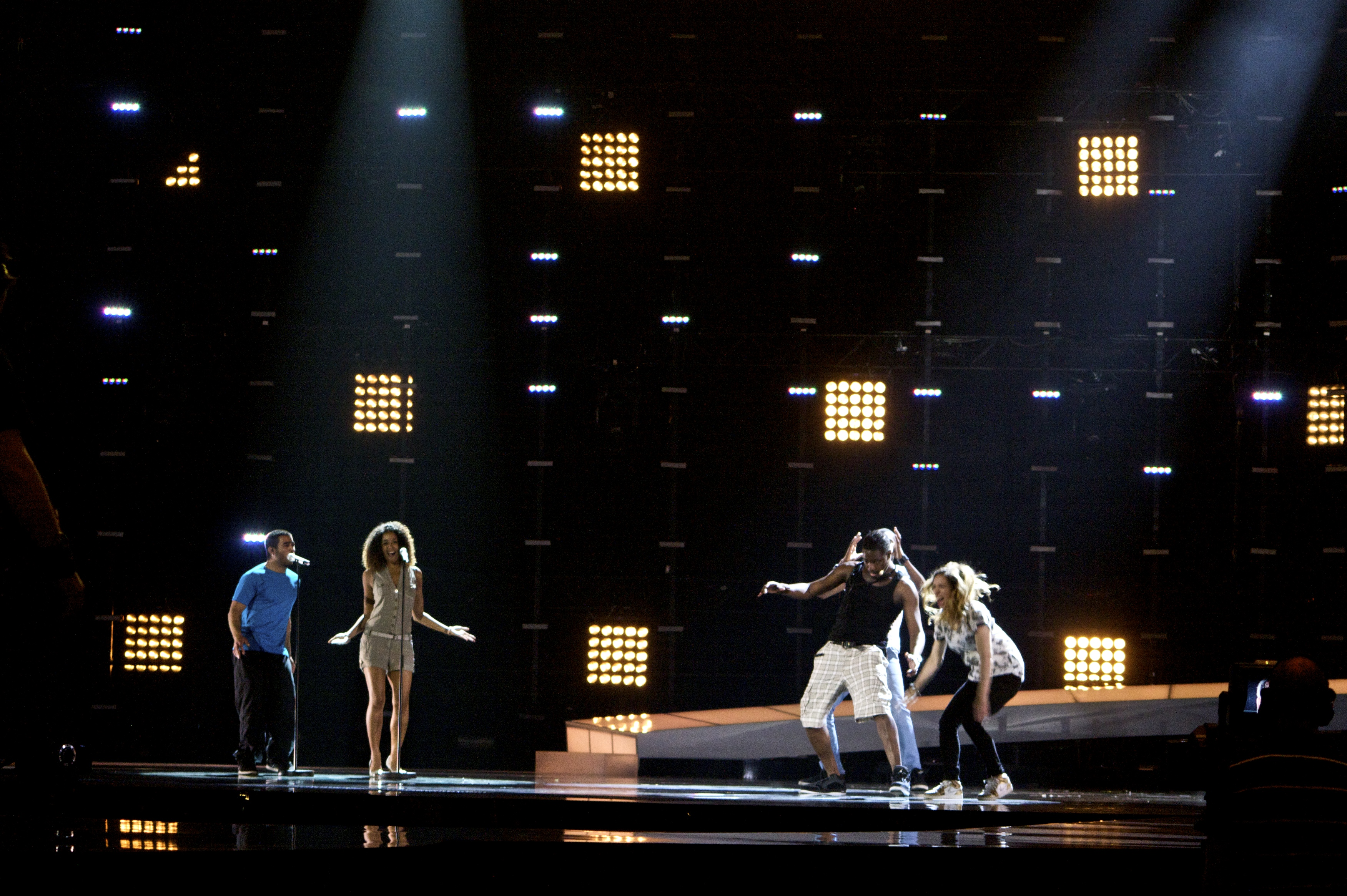 Foto: Vincent Hasselgård, Aktiv I Oslo.no Les artikkel på